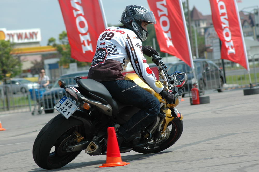 Wojtek "Terminator" Grodzki, mistrz klasyfikacji generalnej sezonu 2012 Honda Gymkhana, na trasie konkursowej podczas 1 rundy zawodów, Warszawa - Marki, 20 maja 2012